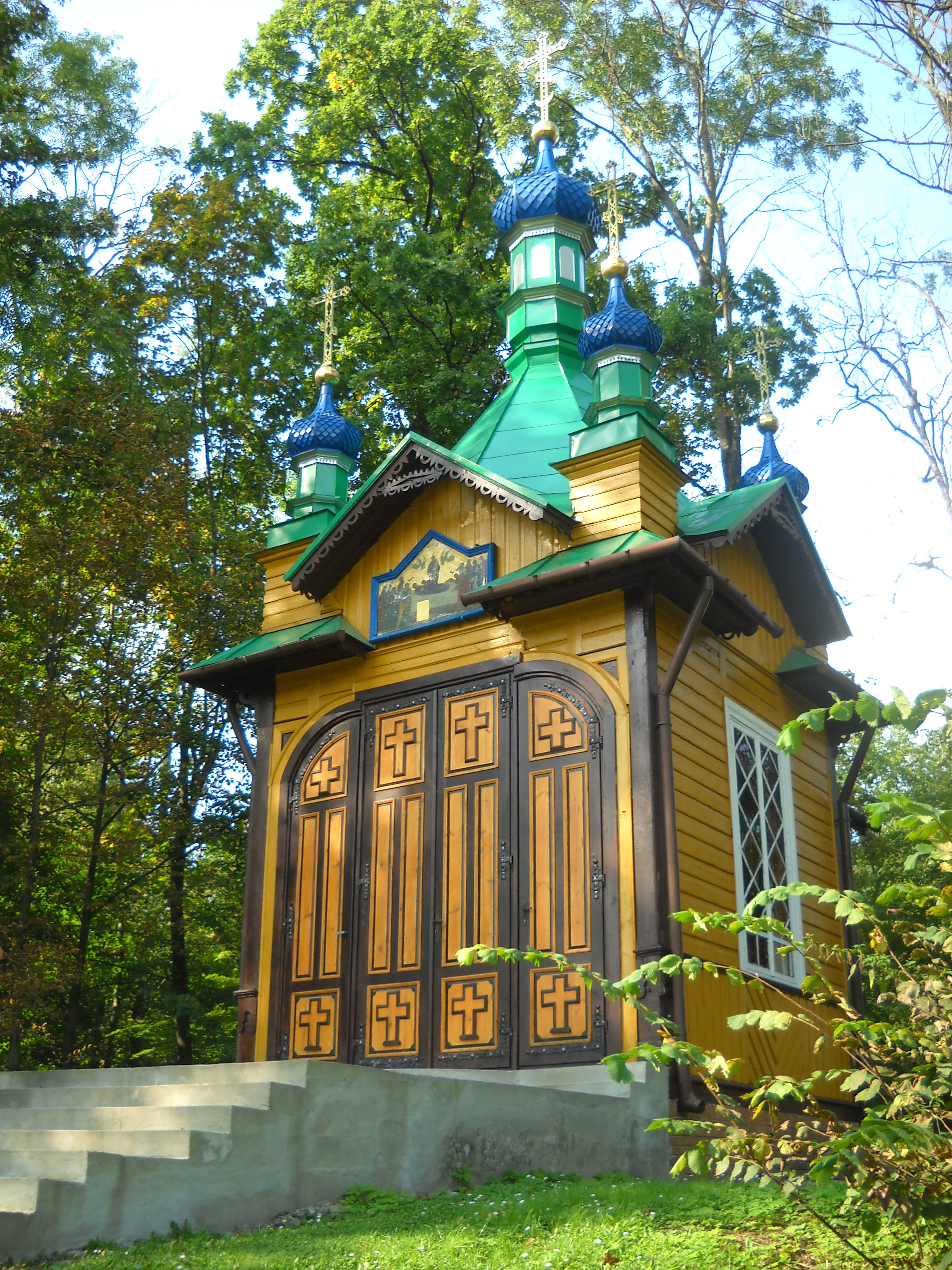 Cerkiewka Zaśnięcia Matki Bożej na terenie monasteru św. Onufrego w Jabłecznej